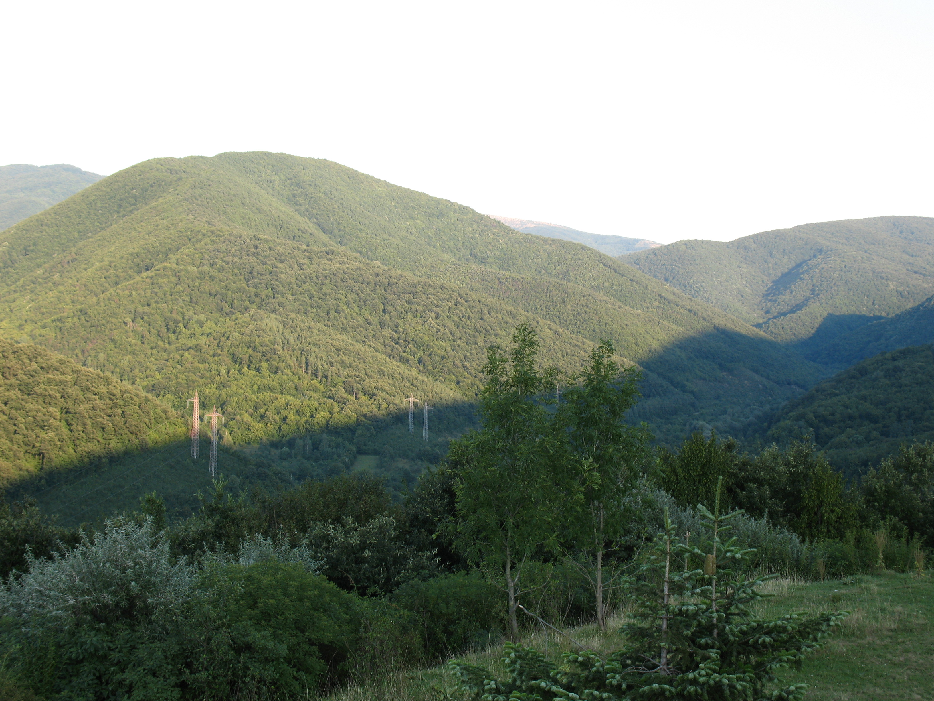 Планинската издънка "Пантата" в прохода Арабаконак - мястото, където четата, водена от Димитър Общи, е устроила засада на Орханийската хазна на 22 септември 1872 г..